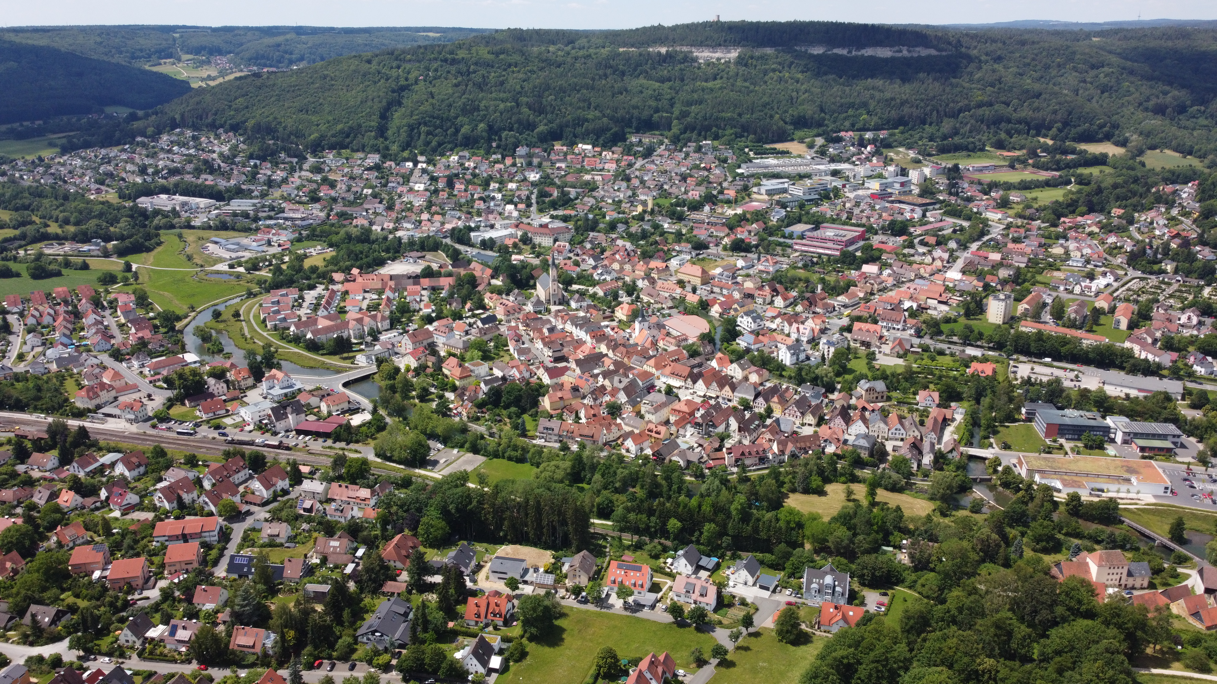 Luftaufnahme über Ebermannstadt